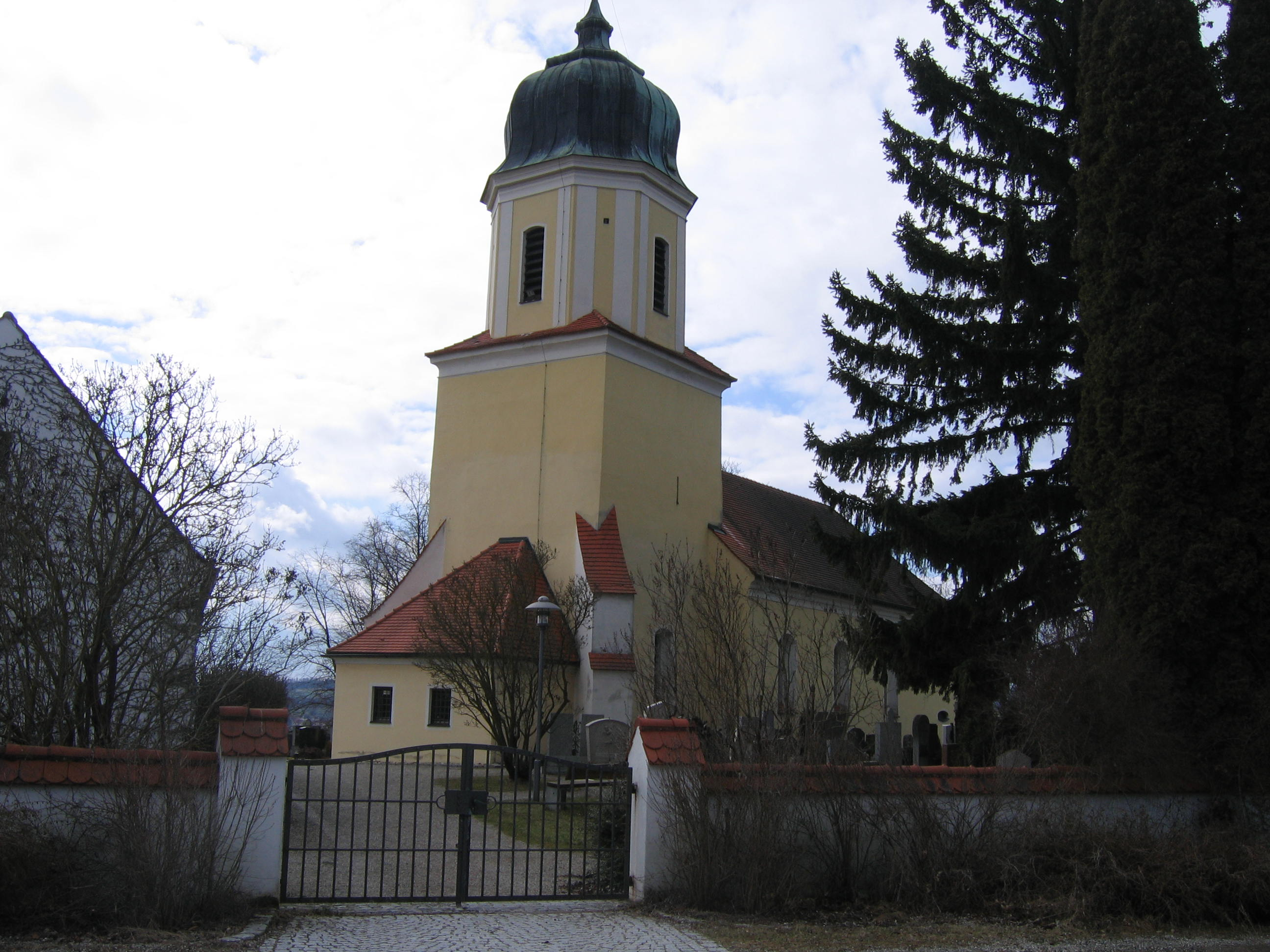 Die Kirche, das Wahrzeichen von Ried bei Neuburg.